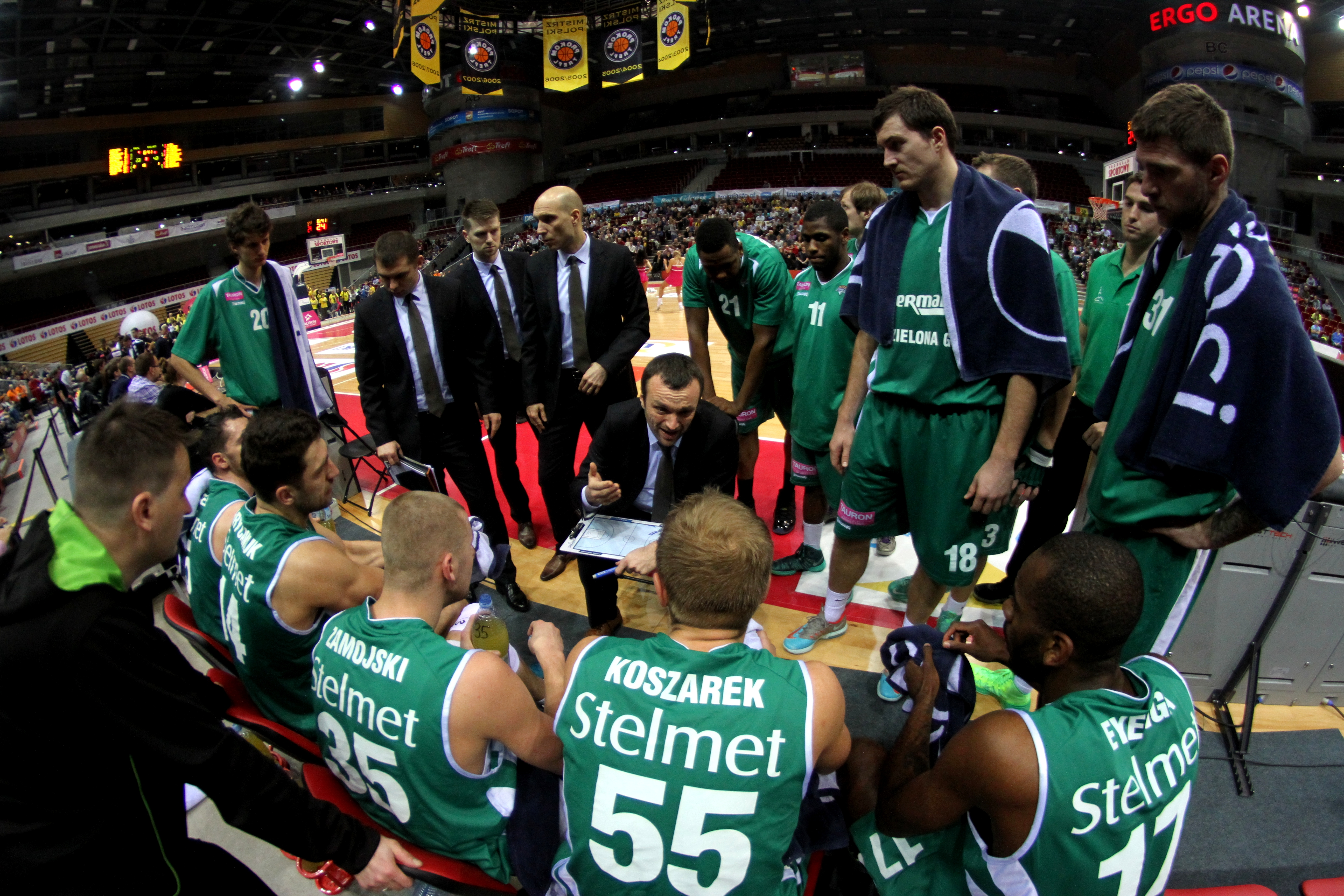 Stelmet Zielona Góra, Tauron Basket Liga